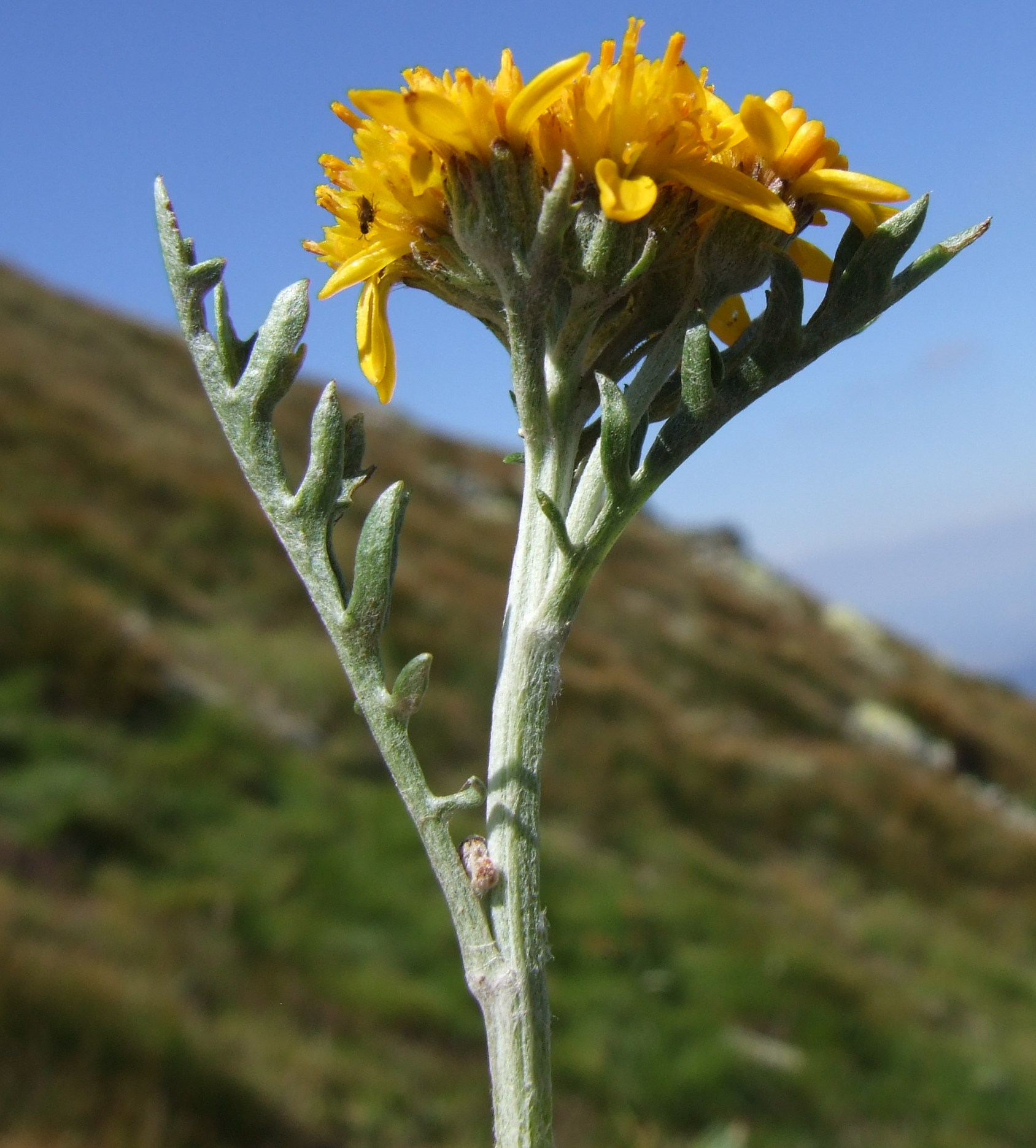 Jacobaea incana subsp. carniolica (pl. starzec kraiński), habitat: West Tatra Mountains, Smutna Dolina